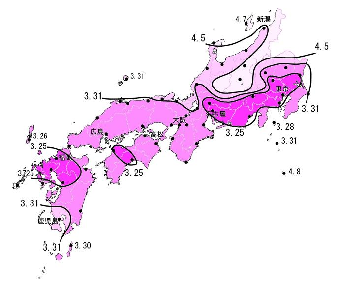 さくらの開花予想の等期日線図（桜前線）。2007年（平成19年）3月14日、気象庁発表。 気象庁の報道発表資料を元に、Pqks758が作成。